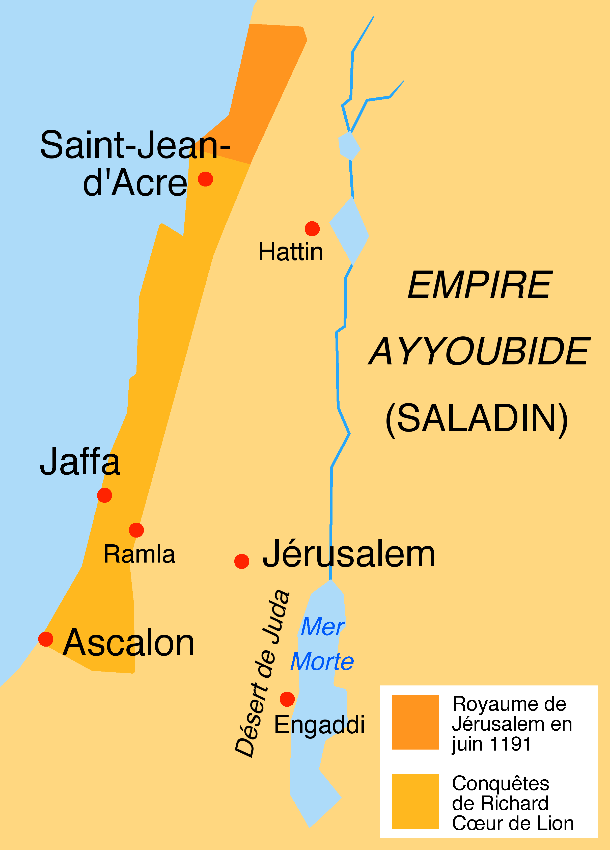 Lieux du roman Le Talisman de Walter Scott : ce qu'il reste du royaume de Jérusalem, et conquêtes de Richard Cœur de Lion (troisième croisade). Je me suis inspiré de Map Crusader states 1190-fr.svg d'Odejea.